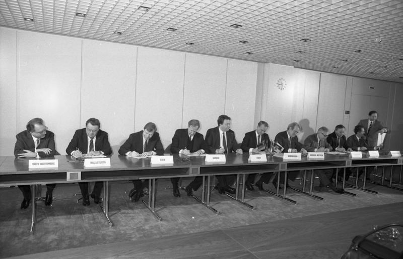 3.4.1987 Unterzeichnung eines Medienstaatsvertrages durch die Regierungschefs der Bundesländer im Bundesrat.